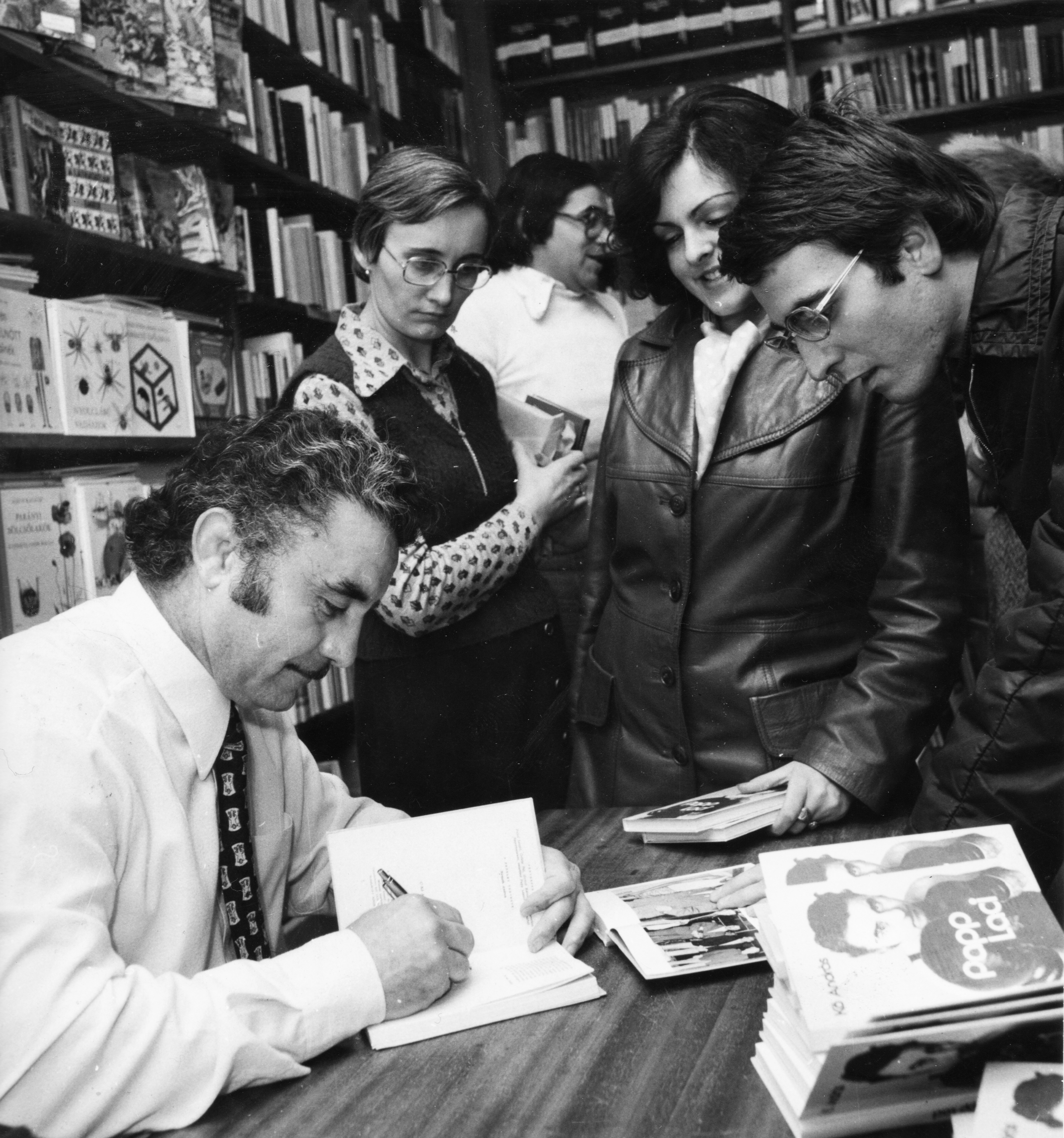 Papp László háromszoros olimpiai bajnok, profi Európa bajnok ökölvívó dedikál. Location: Hungary Tags: celebrity, dedication, olympic champion Title: Papp László háromszoros olimpiai bajnok, profi Európa bajnok ökölvívó dedikál.